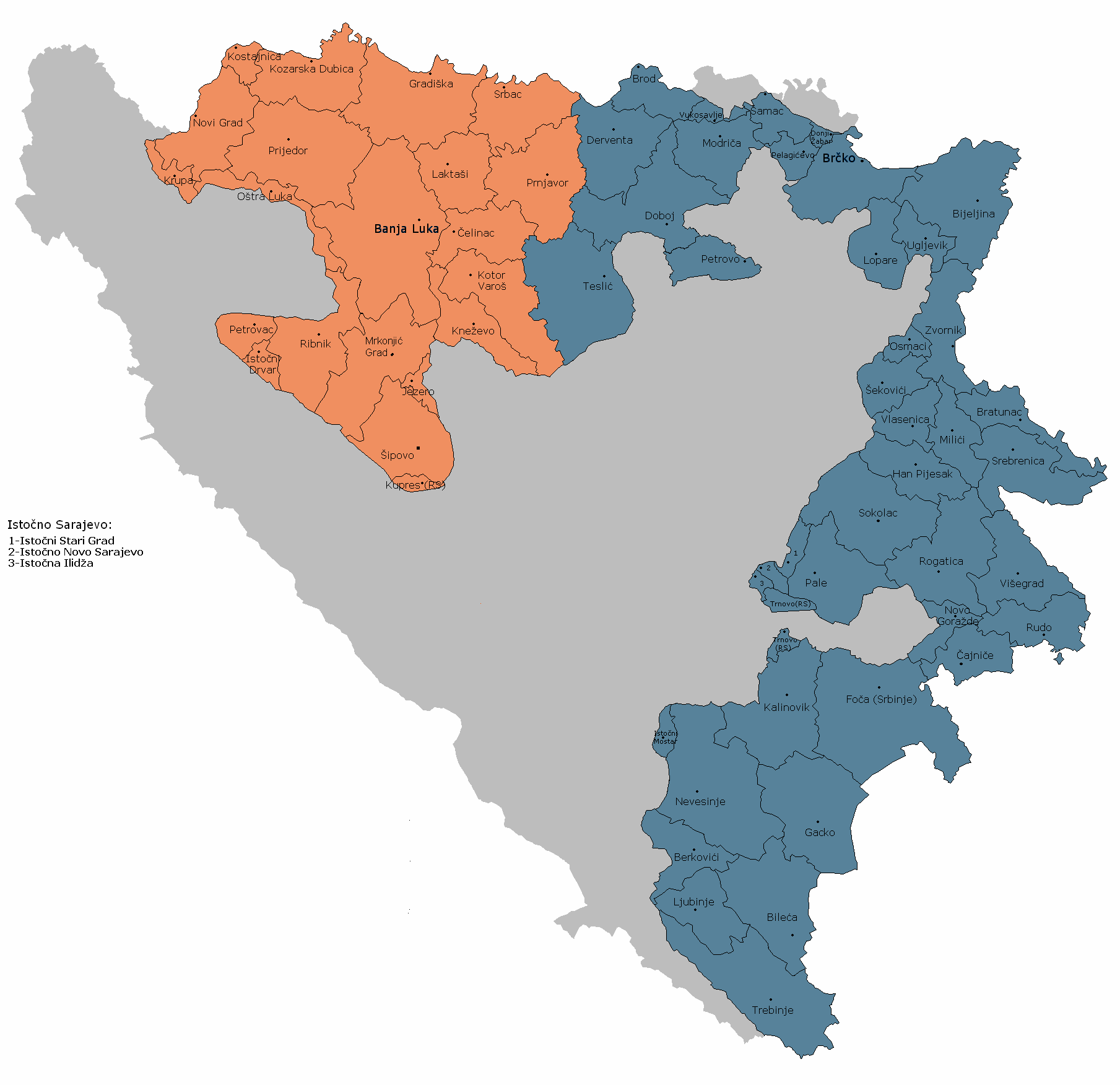 Регија Бања Лука према уџбеницима географије